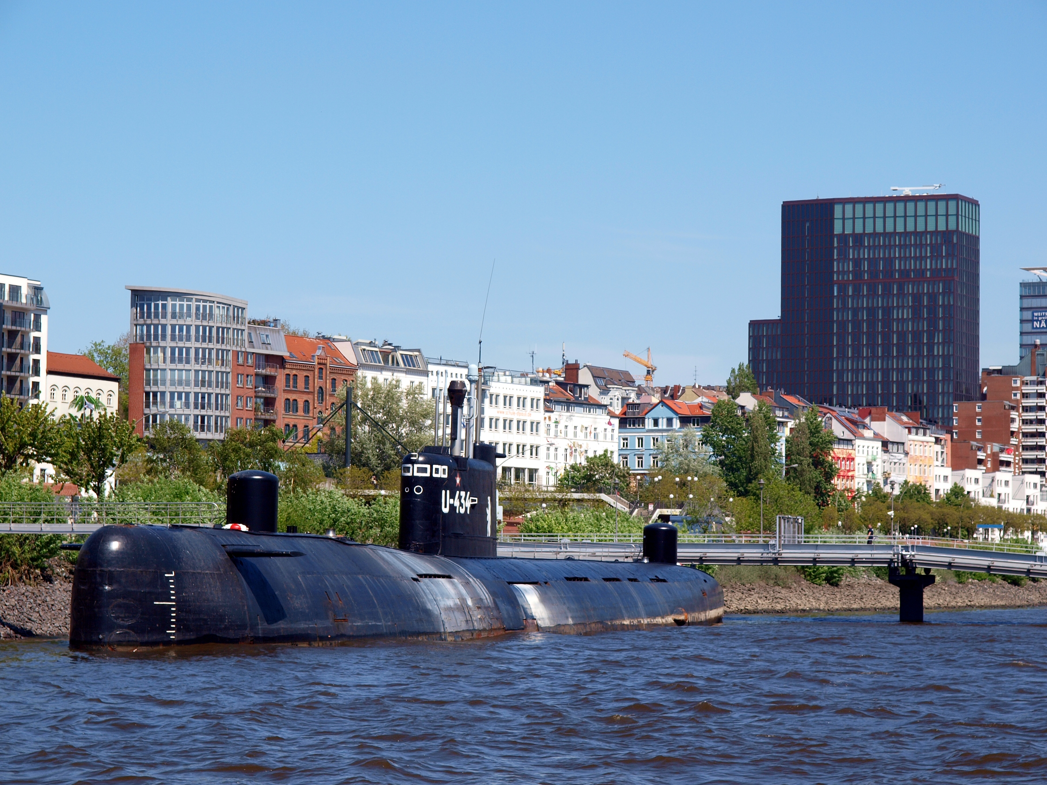 Soviet museum submarine U-434 in Hamburg, Fischmarkt Altona